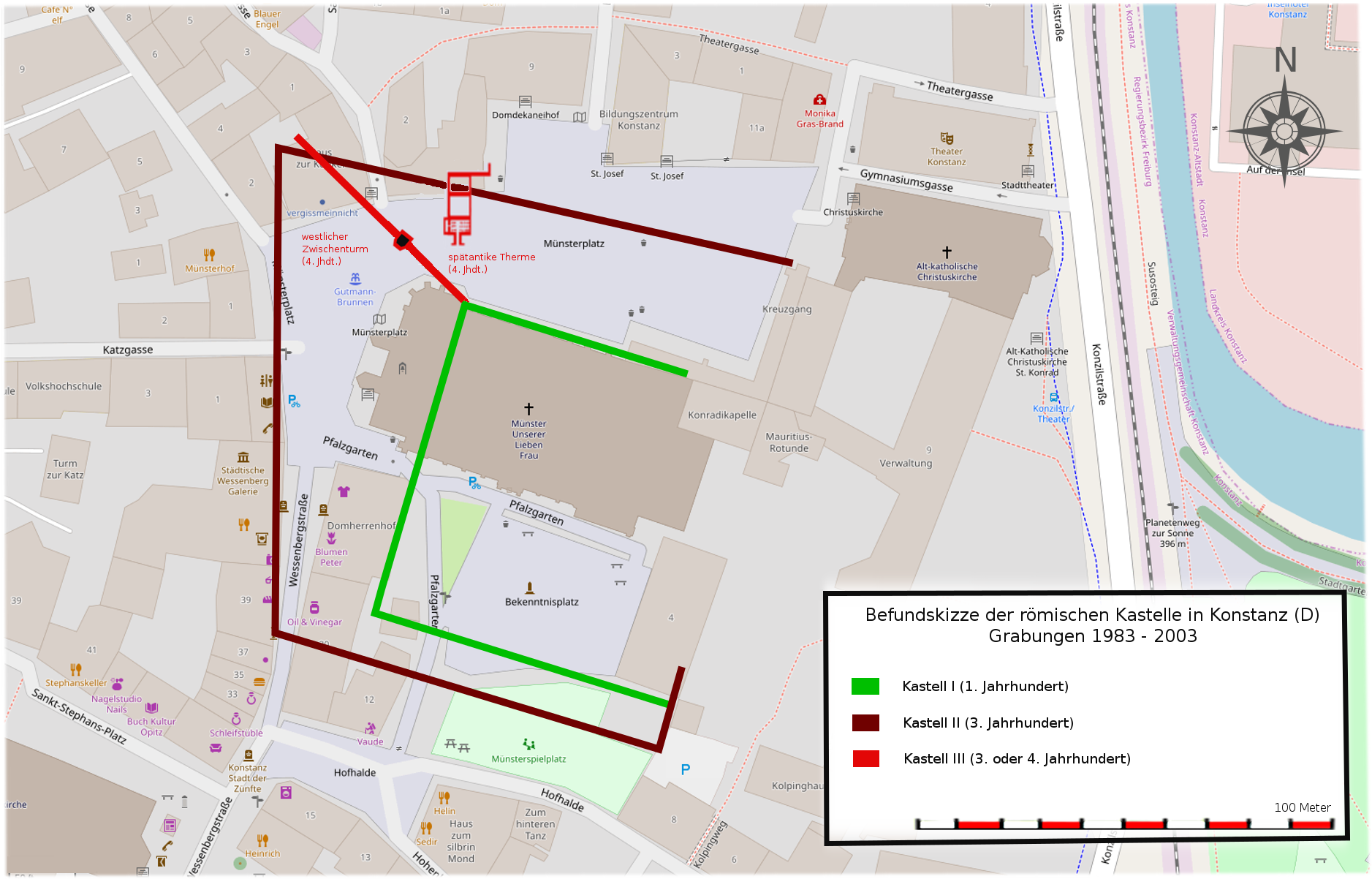 Befundskizze der römischen Kastelle des 3. und 4. Jahrhunderts n.Chr. in Konstanz/Deutschland (1983 - 2003).